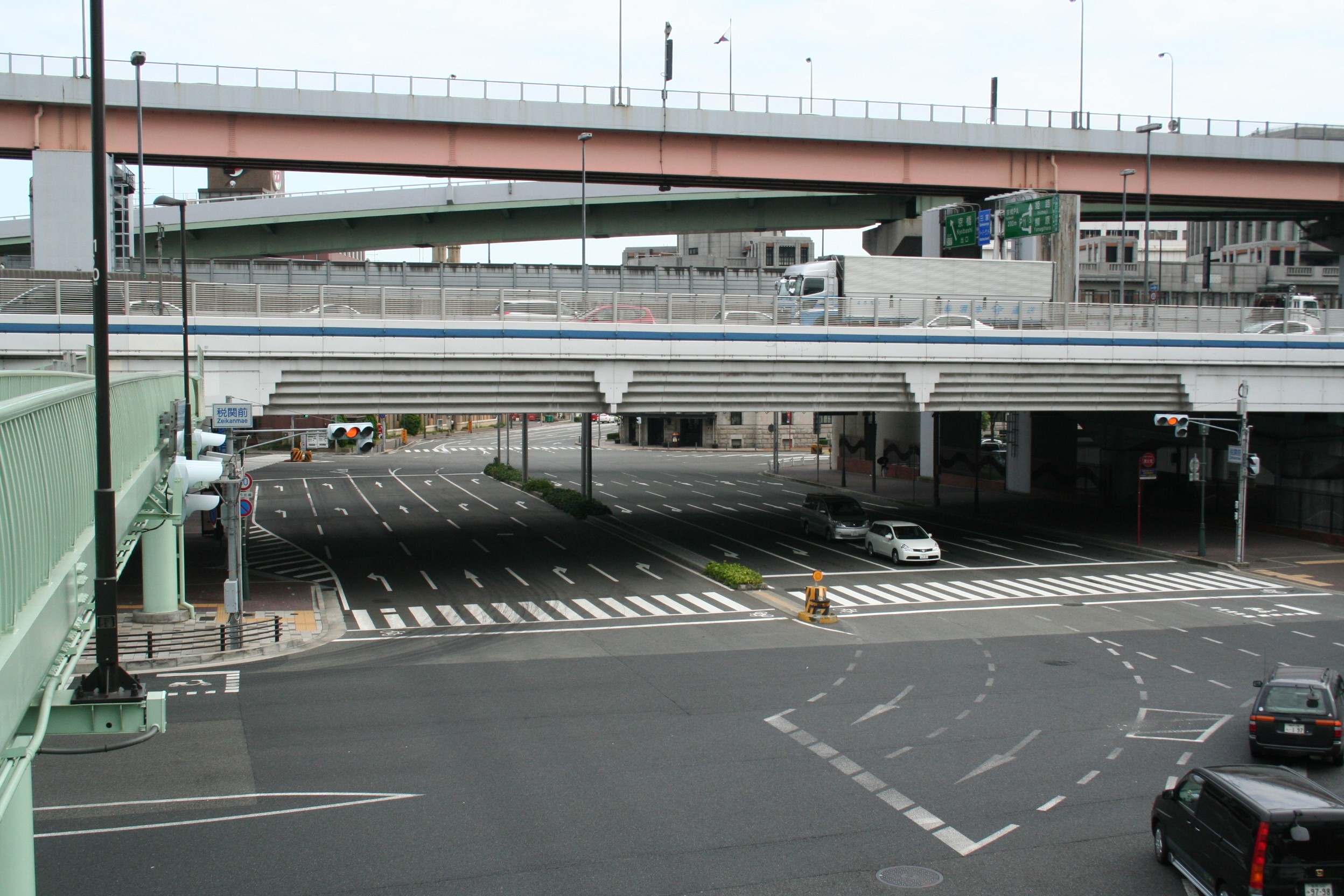 北側から見た国道174号線。その区画のほとんどの部分は高速道路の高架下にある。